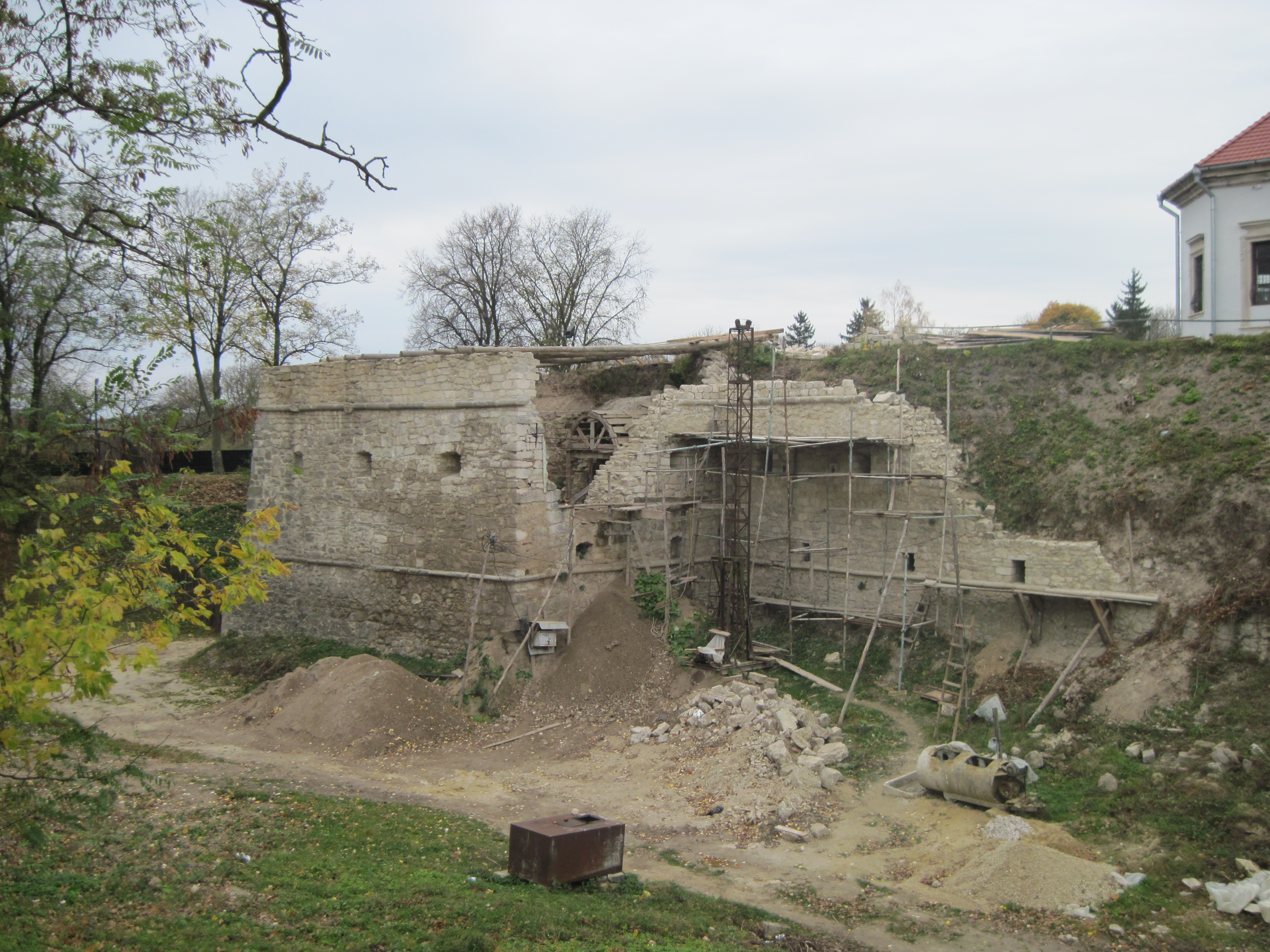 Збаразький замок